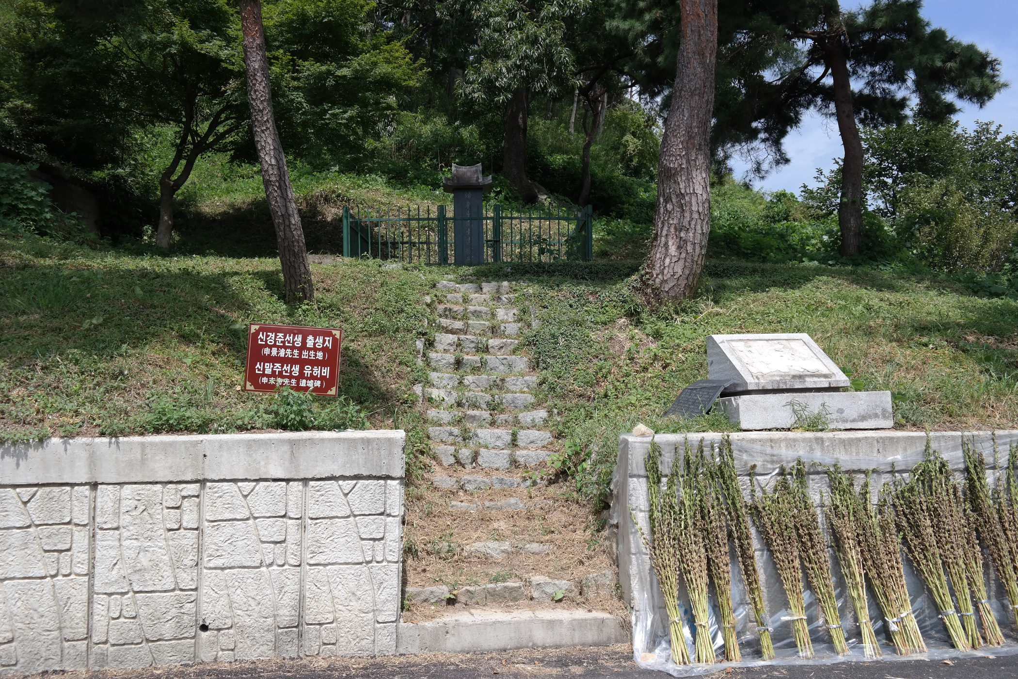 신경준 선생 출생지 (전북 순창군 순창읍 가남리 남산마을)